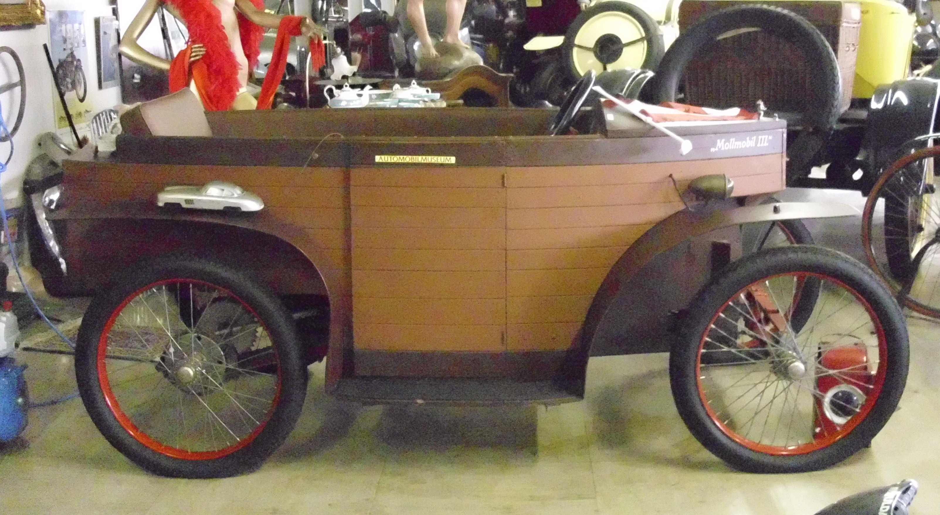 Moll Mollmobil 1924 im Automobilmuseum Stainz